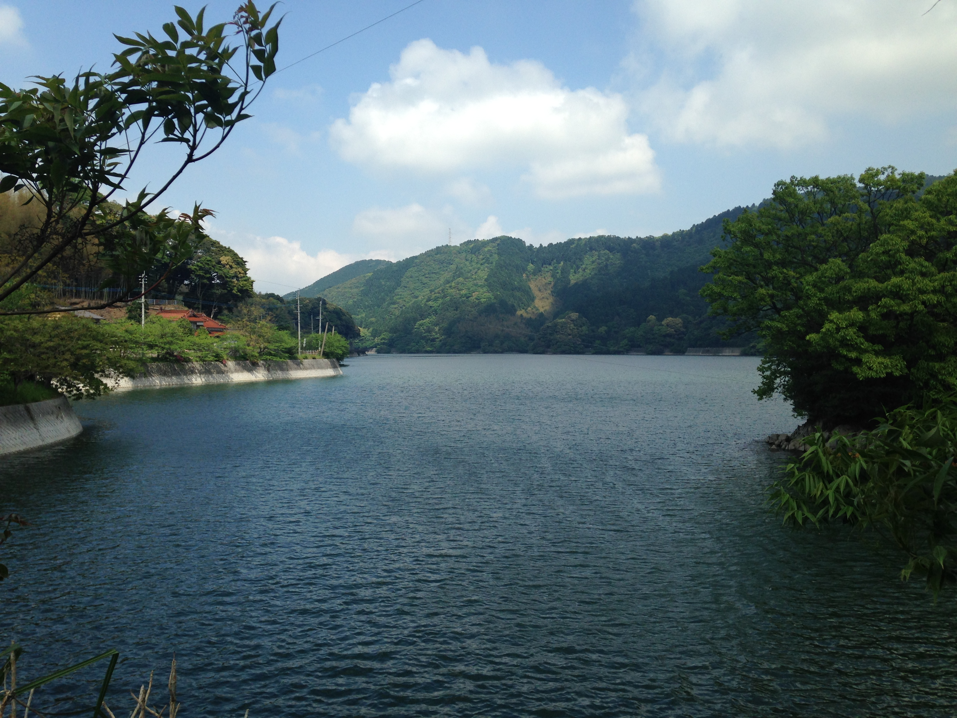 中河内橋より望む河内貯水池